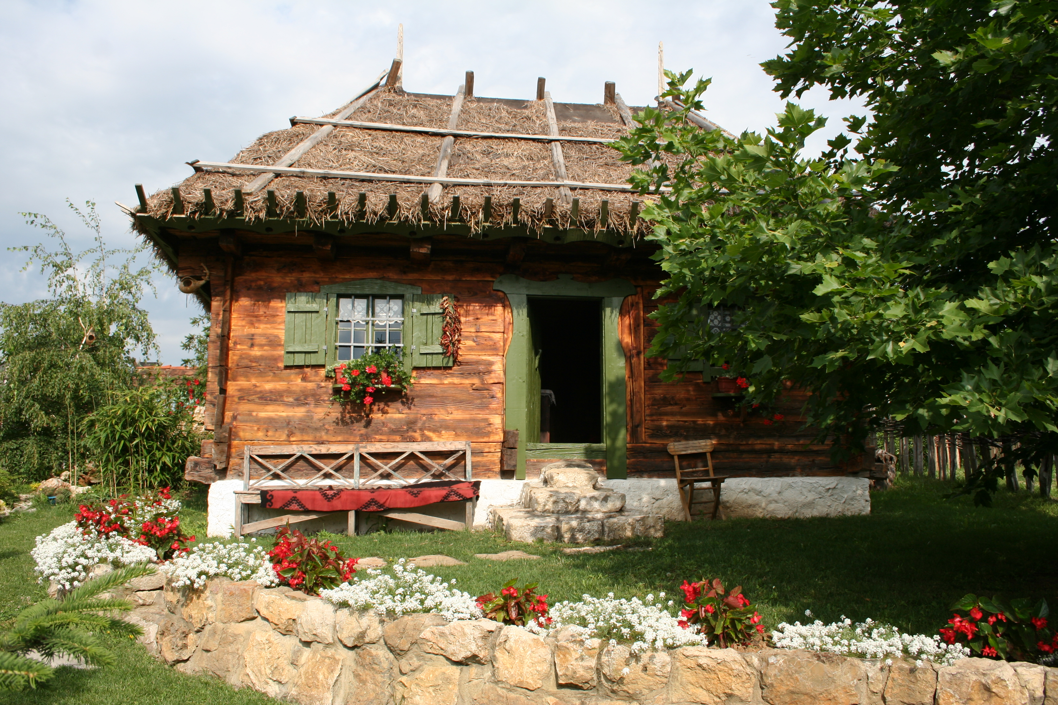 Etno selo "Kneževa večera" Belotić, opština Vladimirci